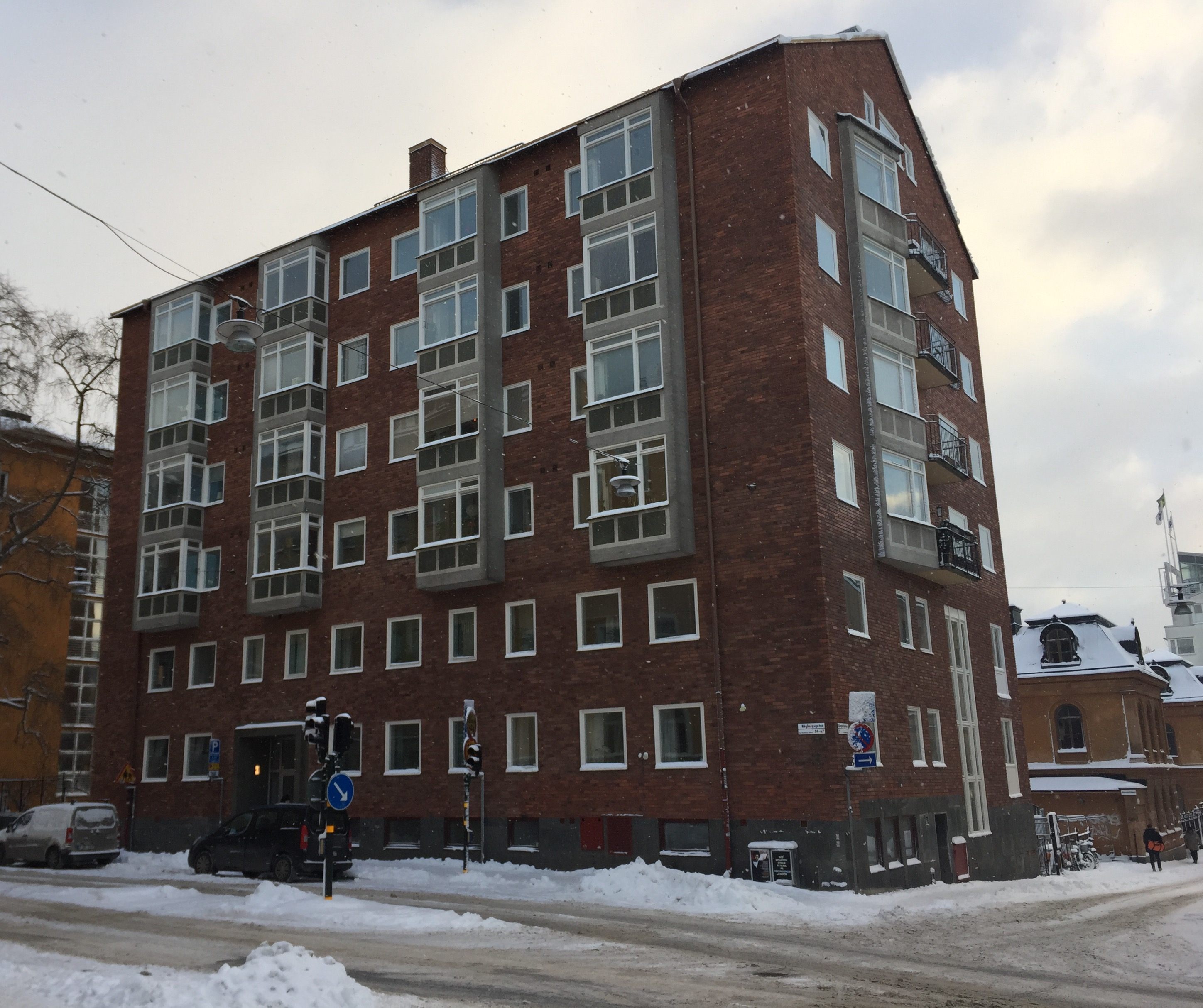 Byggnad på Högbergsgatan 67 i Stockholm. Har tidigare inrymt Josefinahemmet (till 1988) och Sankta Birgittas Folkhögskola